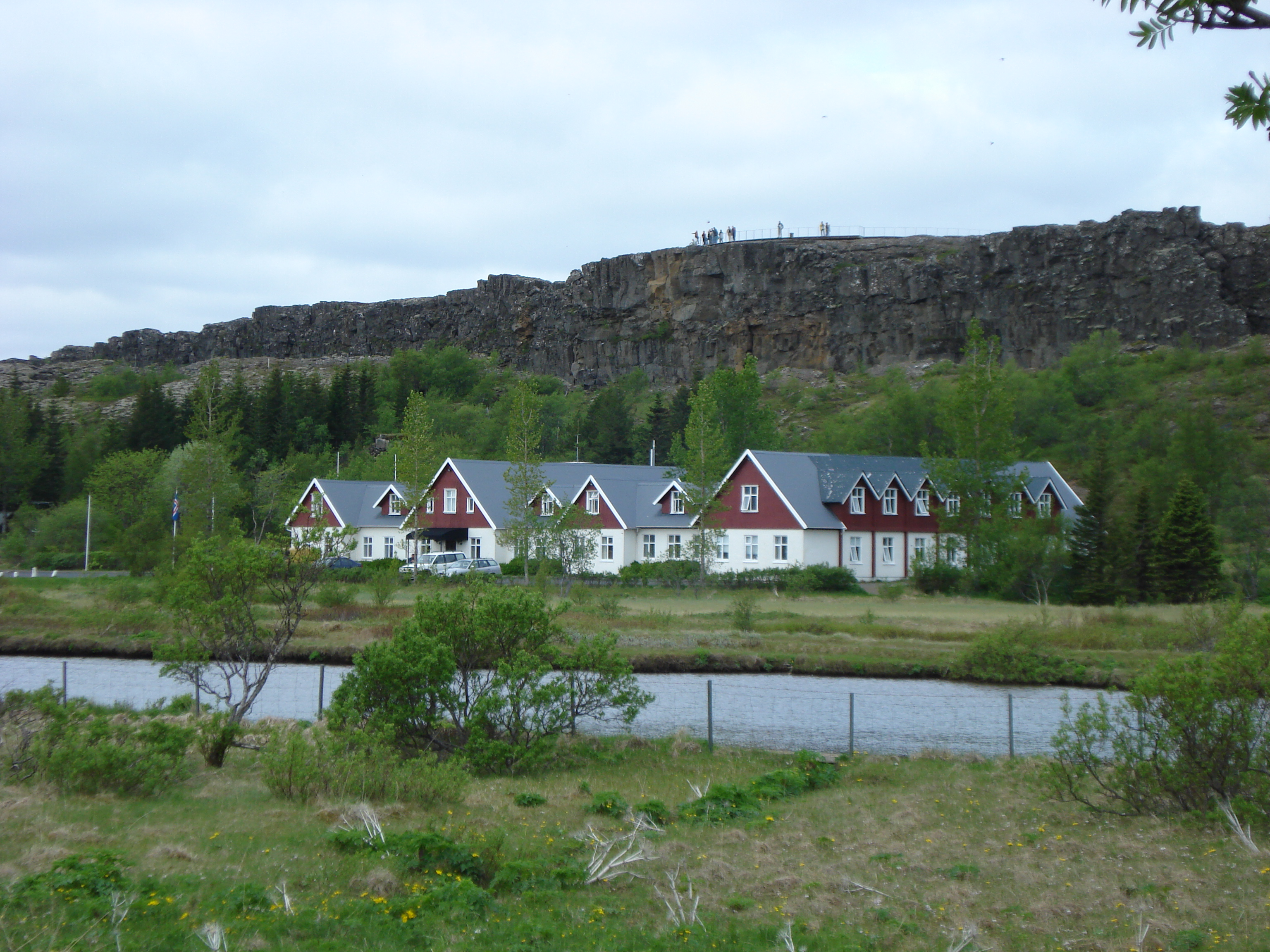 Hotel Valhöll, Thingvellir, Iceland, fertiggestellt 1929.